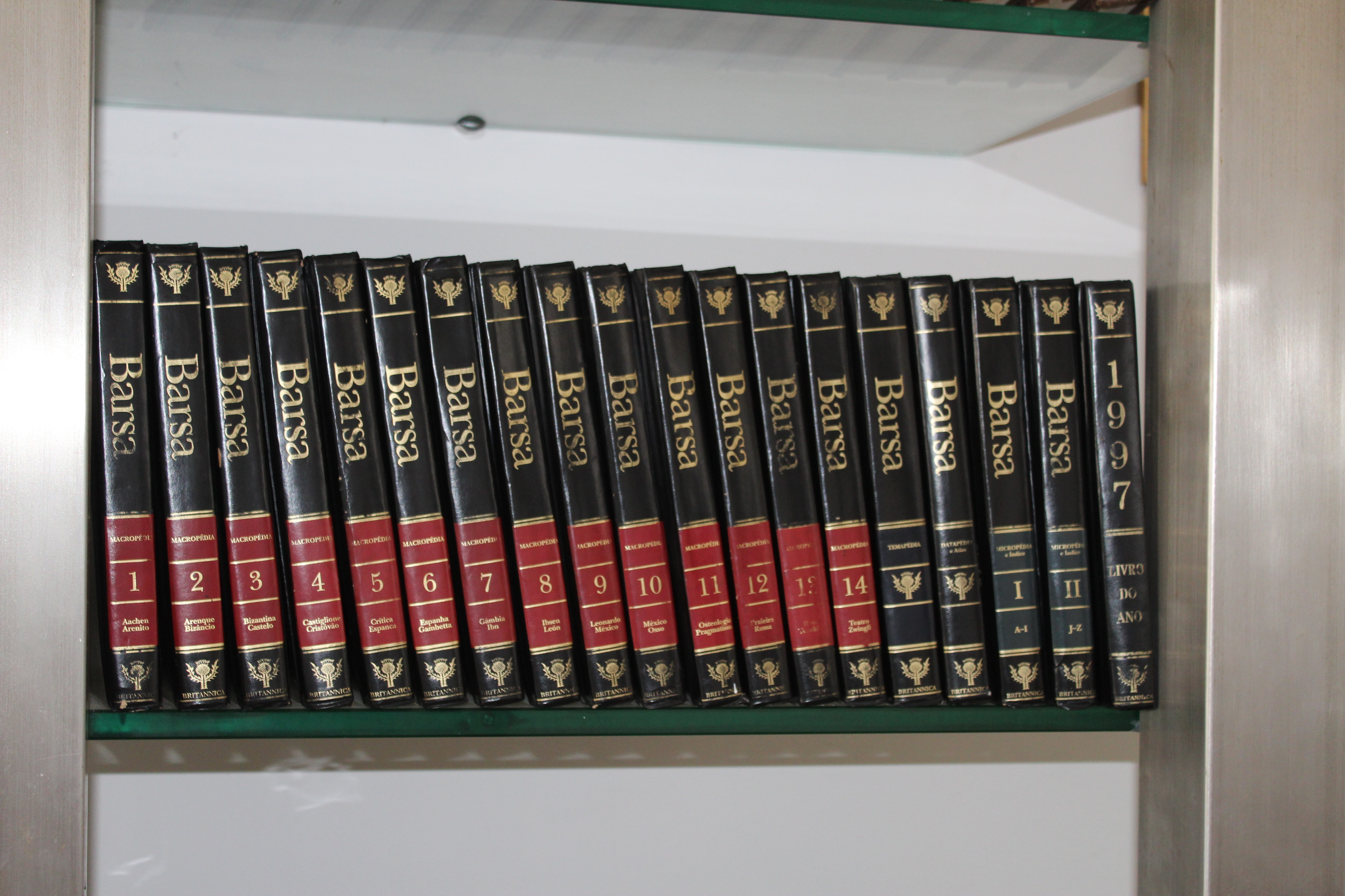 Coleção da Barsa na biblioteca da Câmara Municipal de Sobral.